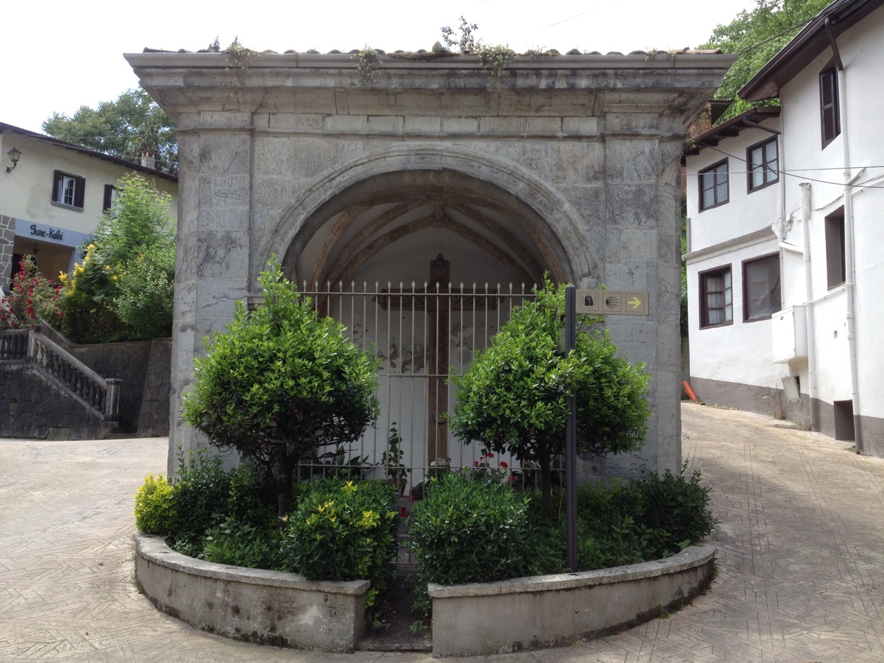 Gurutze Santuaren santutxoa